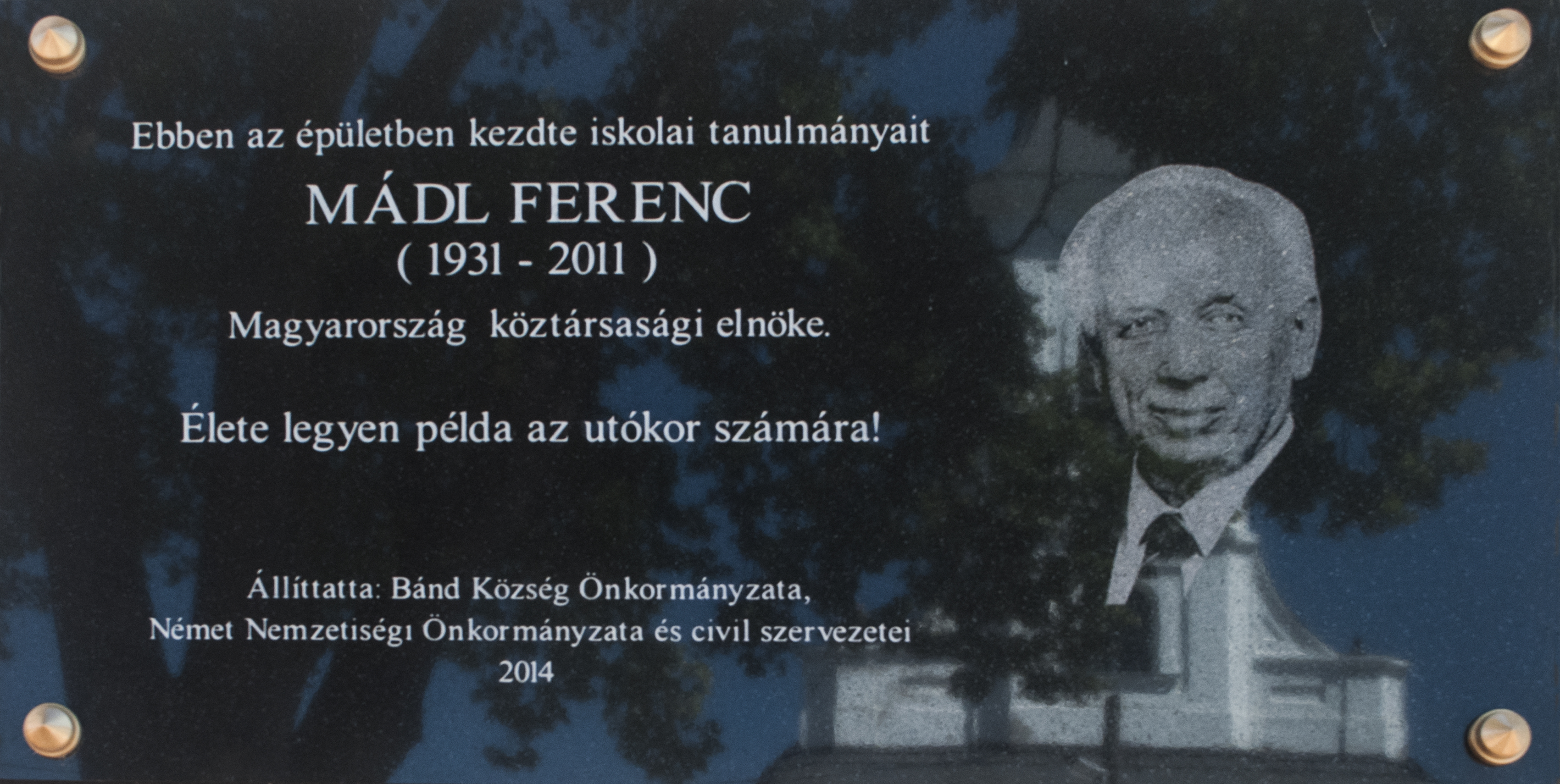 Mádl Ferenc emléktáblája a Veszprém megyei Bándon